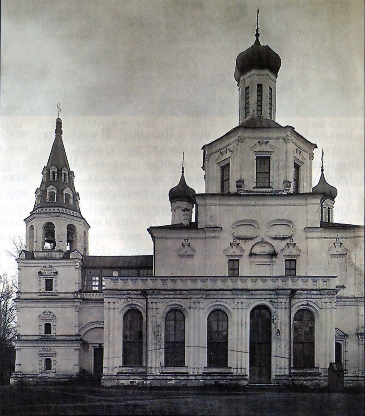 Церковь святого Царевича Иоасафа в царской усадьбе Измайлово (1684—1687 гг.). Перестроена из церкви 1678—1679 гг. Снесена в 1937 году.